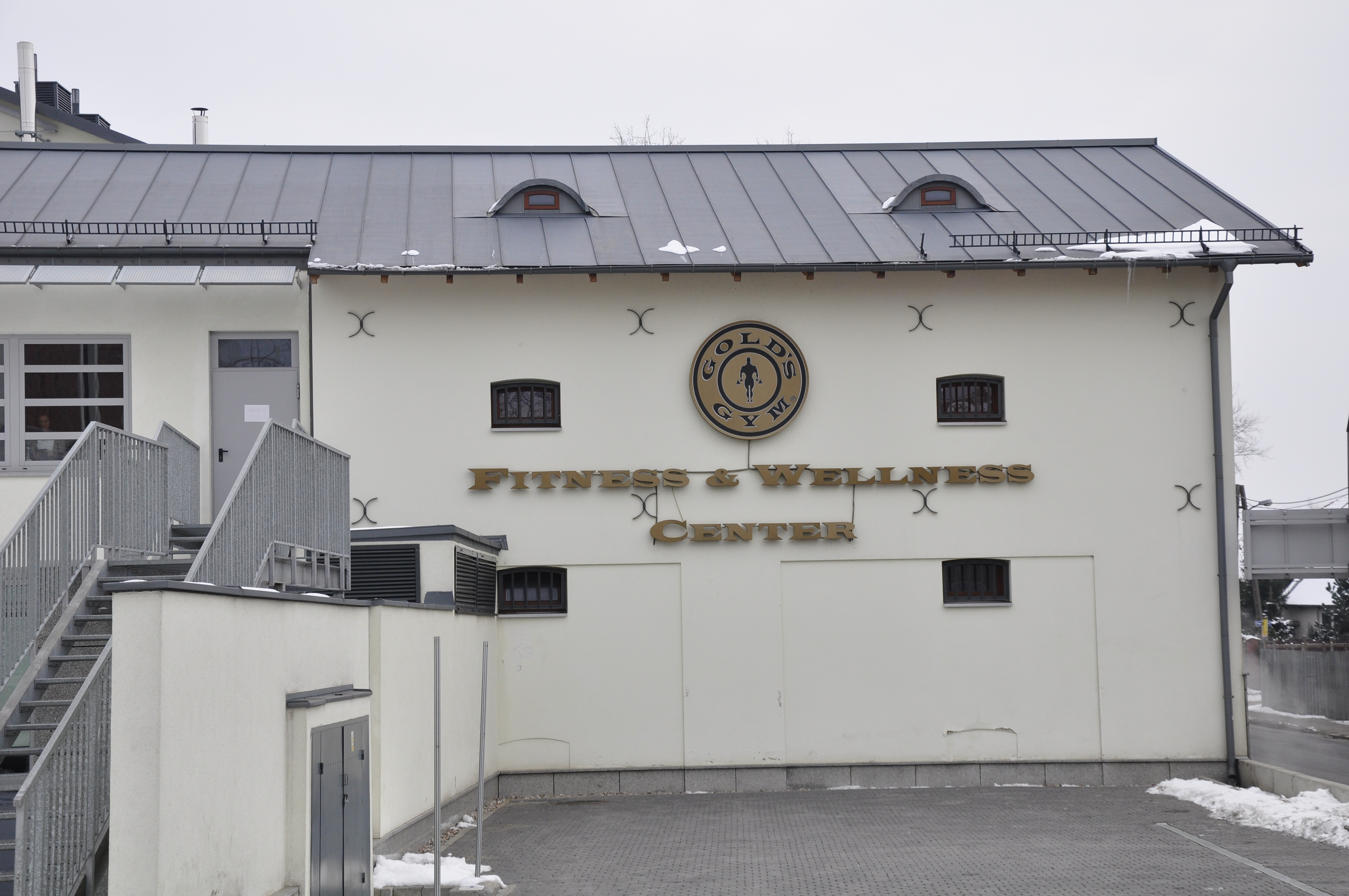 Fitnessclub Gold's Gym in Wilanow, Warschau